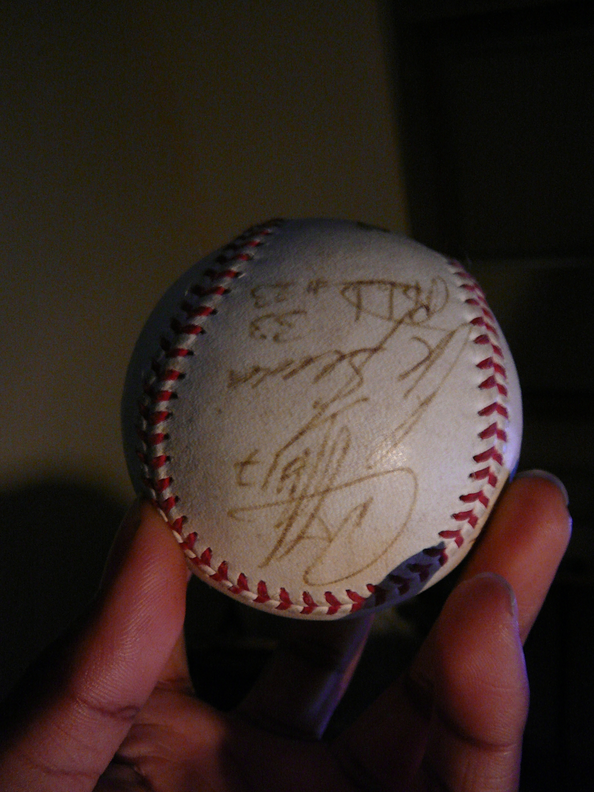 Dit de honkbal bal die in de wedstrijd Nederland - Cuba is gebruikt. (Ik ben er aangekomen door: Ik heb in een rolstoel gezeten en ik stond langs de kant en de directeur van de honkbalweek deed een woordje toen kreeg ik die bal van hem). (Gesingeerd door het Nederlandse Honkbalteam)